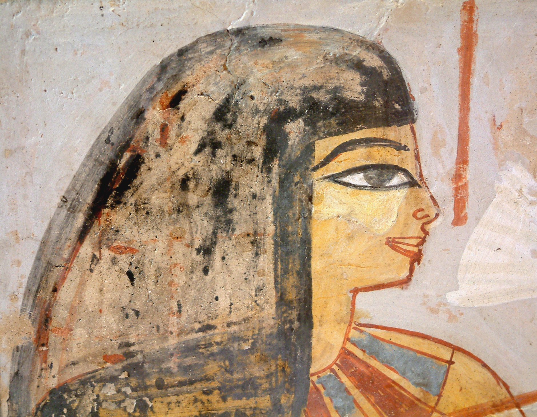 Fragment de la décoration d'une tombe : femme à une cérémonie. Règne de Thoutmosis IV ou Aménophis III. (Détail).